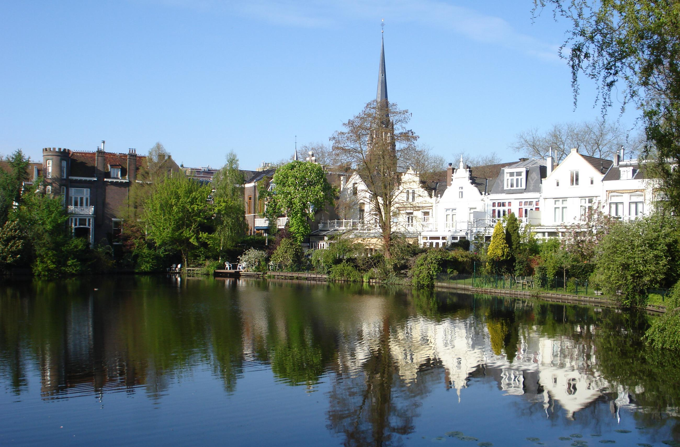 Vijverweg, straat in Rotterdam Kralingen.